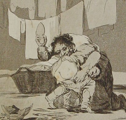 Detalle 1 del Capricho nº 25: Francisco Goya y Lucientes, Pintor de Goya, serie Los Caprichos